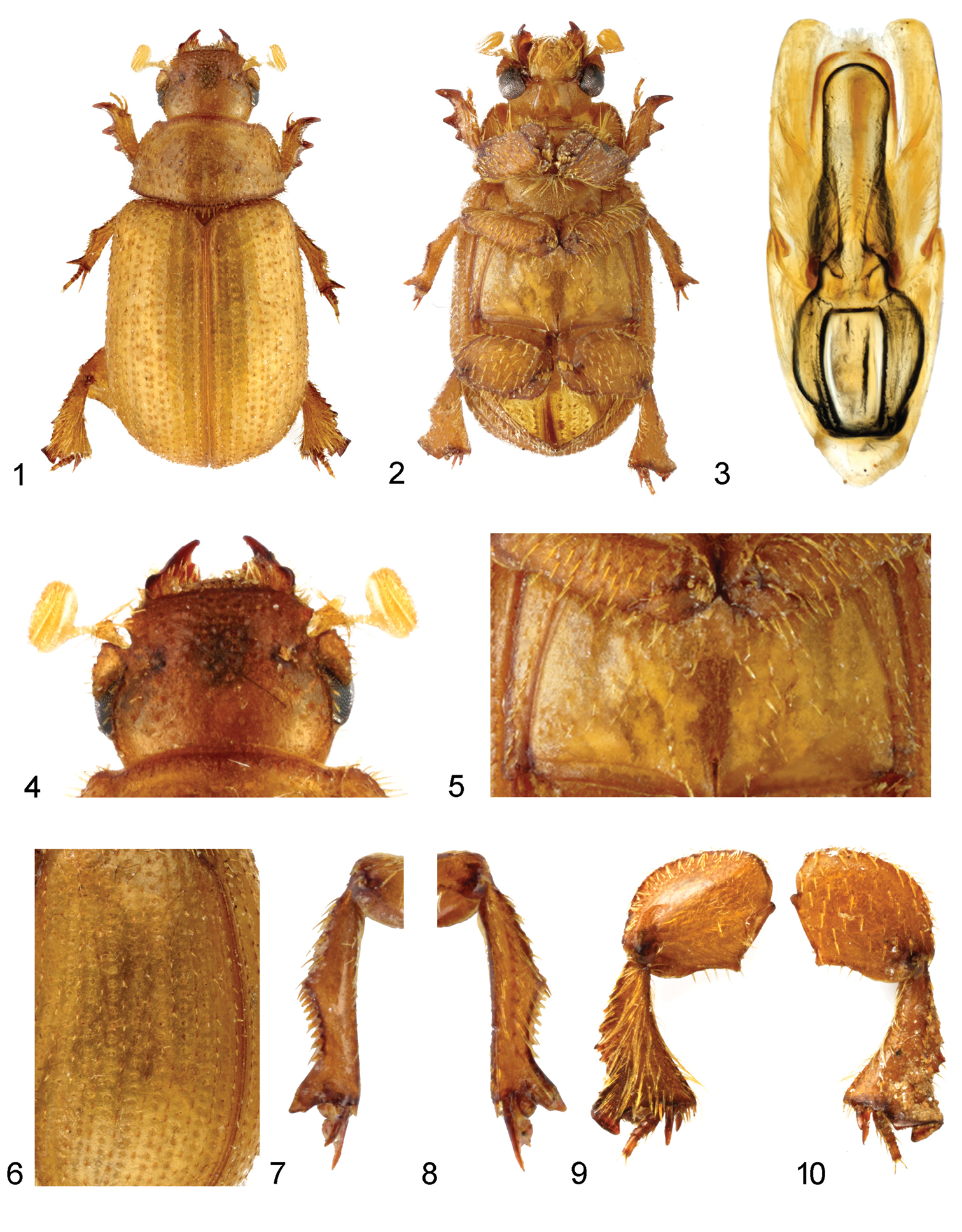 Figures 1–10; Glaresis hespericula sp. n. 1 habitus, holotype, ♂, dorsal view 2 habitus, paratype, ♀, ventral view 3 aedeagus, dorsal view 4 head, dorsal view 5 meso-metaventral area, ventral view 6 detail of left elytron, dorsal view 7, 8 – left middle leg (7 dorsal view, 8 ventral view) 9, 10 right hind leg (9 dorsal view, 10 ventral view). Not to scale.